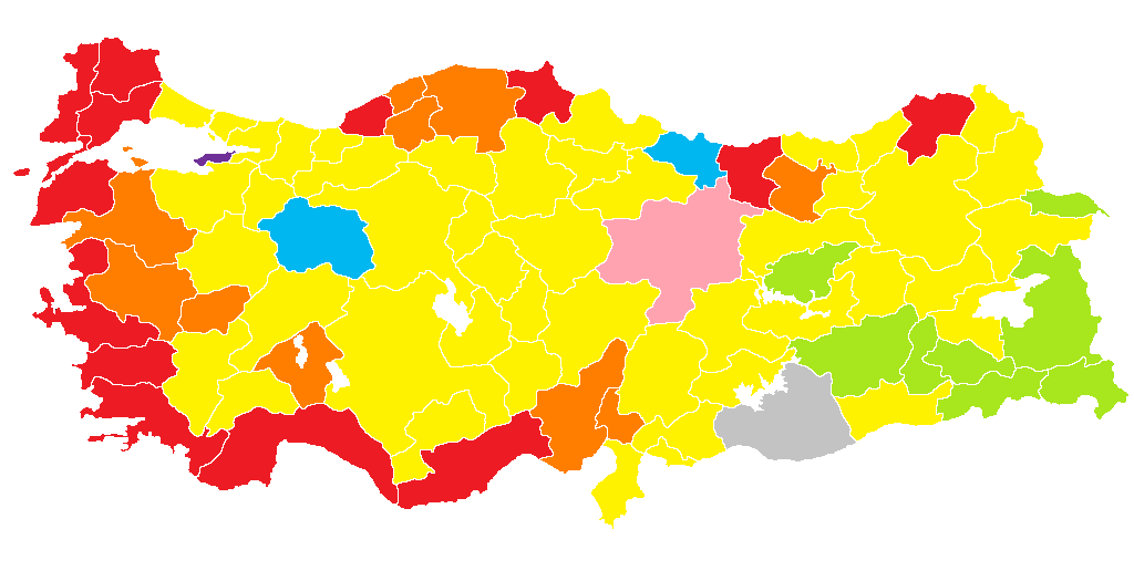 2009 yerel seçimleri